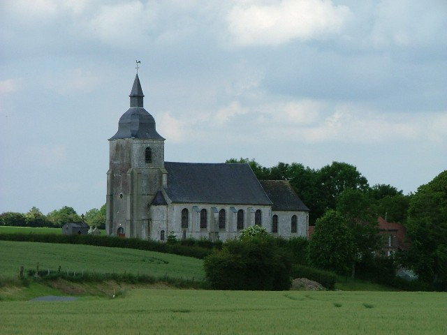 église de Pierremont